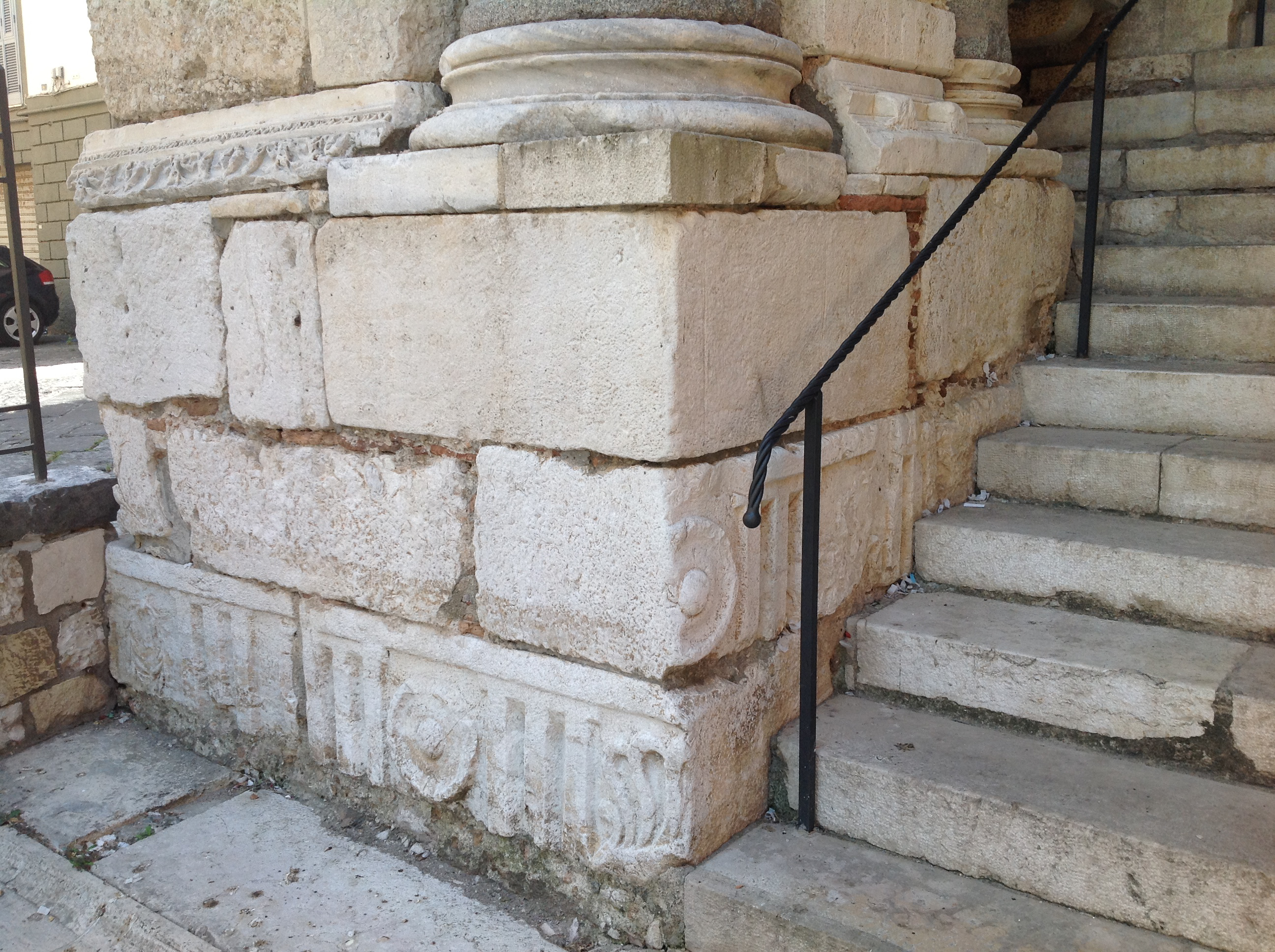 Metope e triglifi sul lato anteriore esterno del basamento del campanile, alla sinistra dell'arco della scalinata.